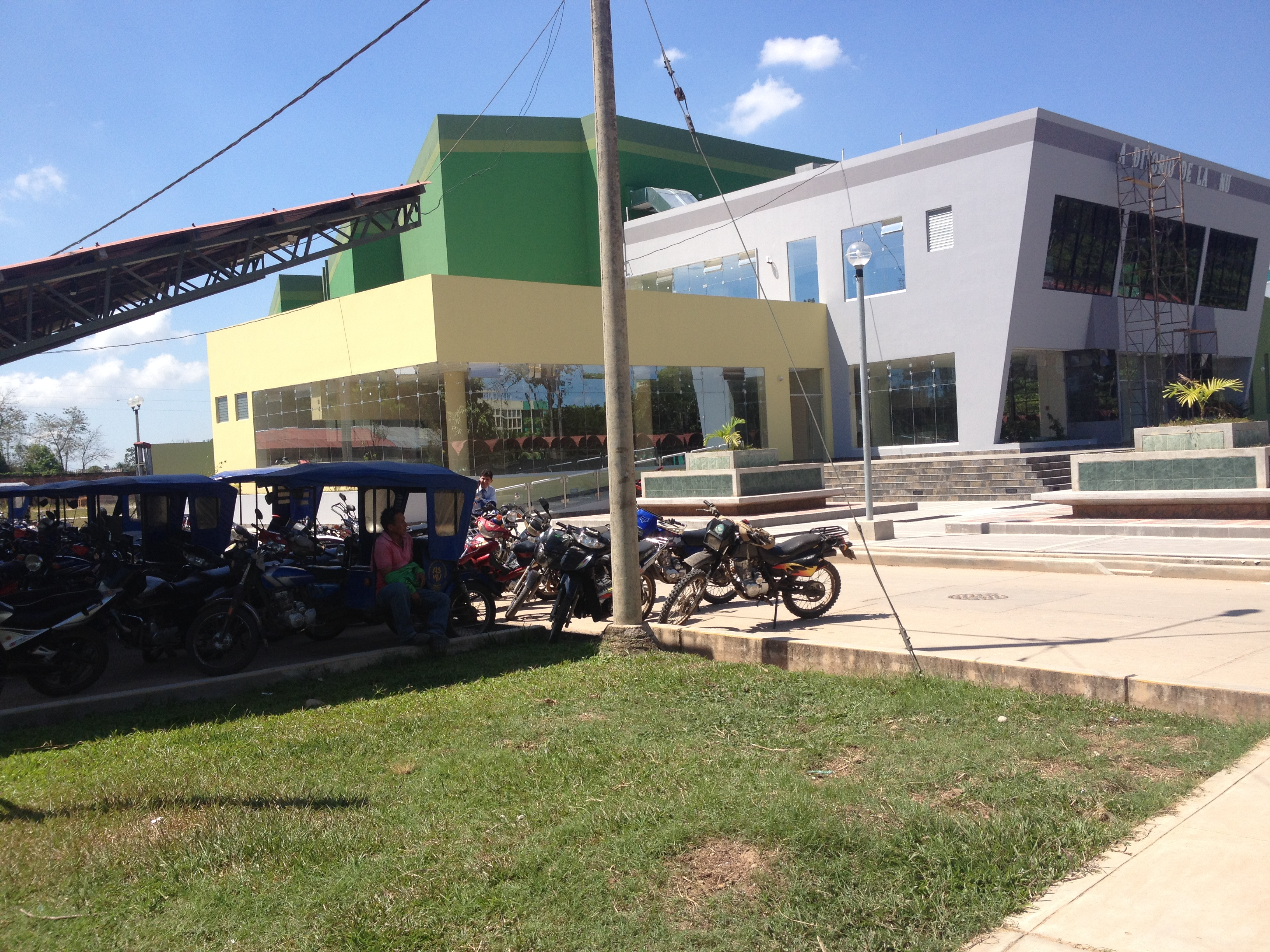 Tomado en los interiores de la universidad nacional en Pucallpa. El auditorio está por inagurarse, remodelado desde el 2013.